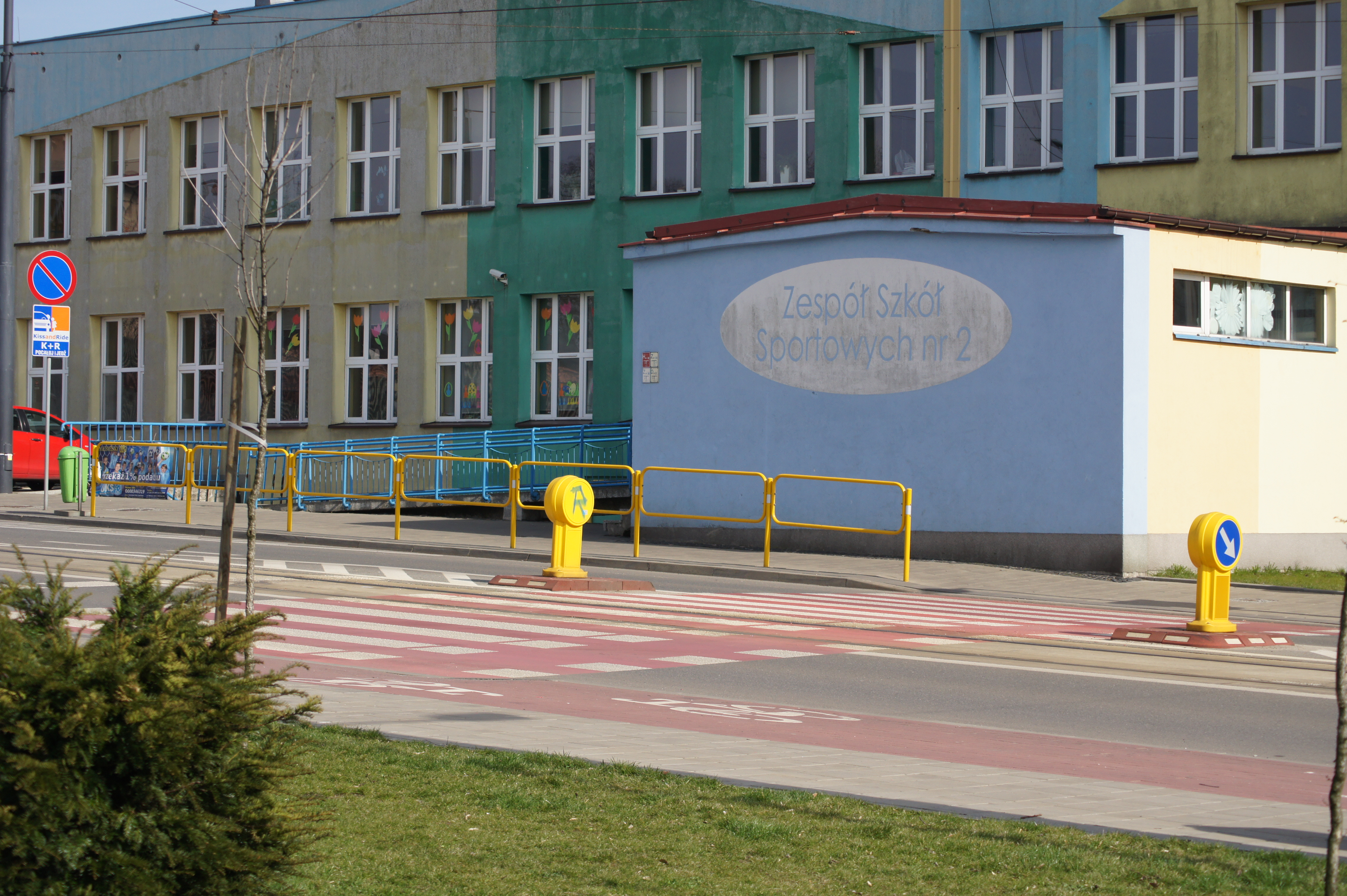 Zespół Szkół Sportowych w Chorzowie im. Gerarda Cieślika (1)